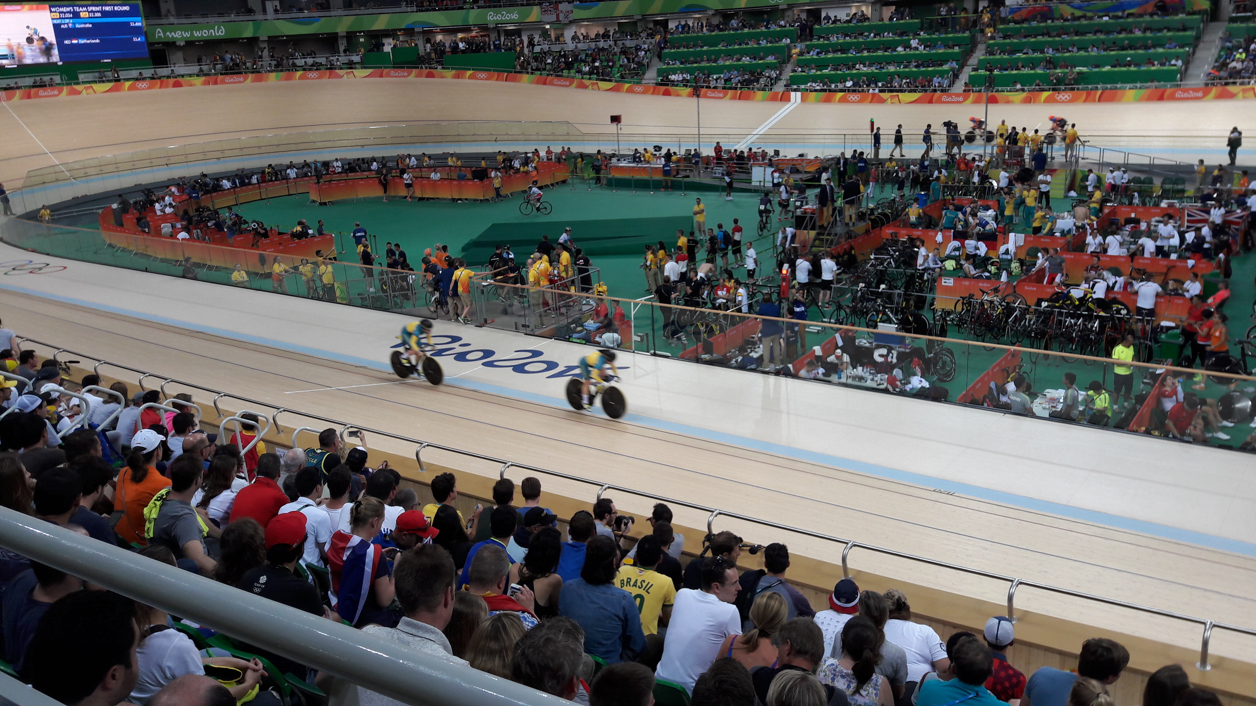 Competição no velódromo